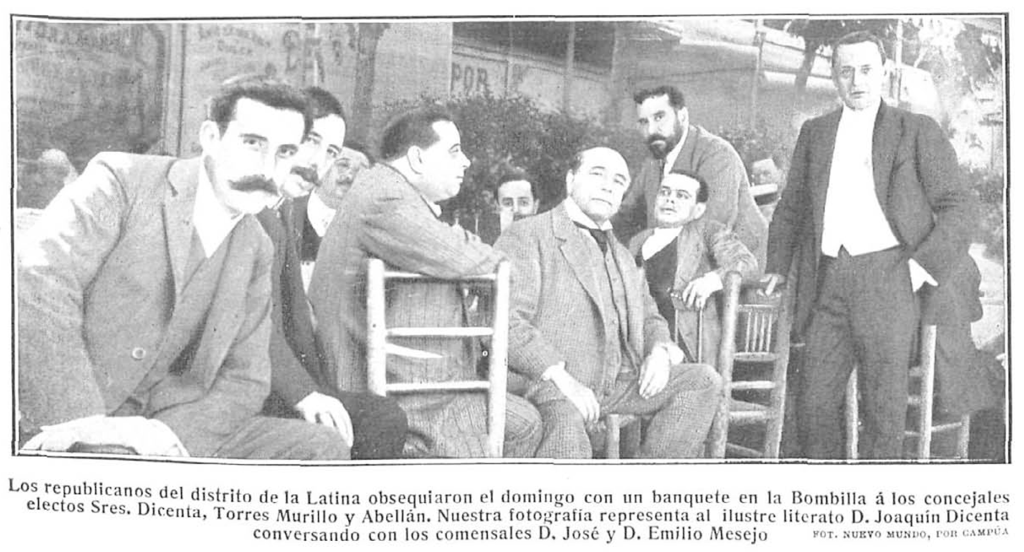 Los republicanos del distrito de la Latina obsequiaron el domingo con un banquete en la Bombilla á los concejales electos Sres. Dicenta, Torres Murillo y Abellán. Nuestra fotografía representa al ilustre literato D. Joaquín Dicenta conversando con los comensales D. José y D. Emilio Mesejo.